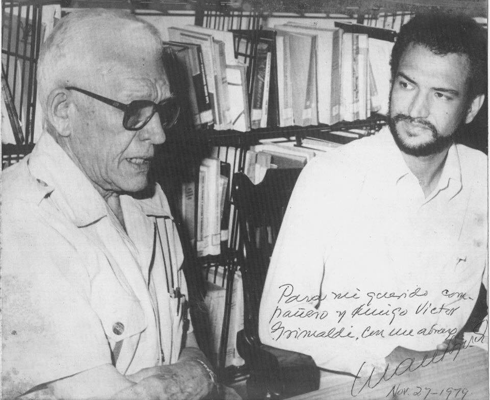 Victor Manuel Grimaldi Céspedes con Juan Bosch, foto dedicada con la firma del escritor y político dominicano.JPG